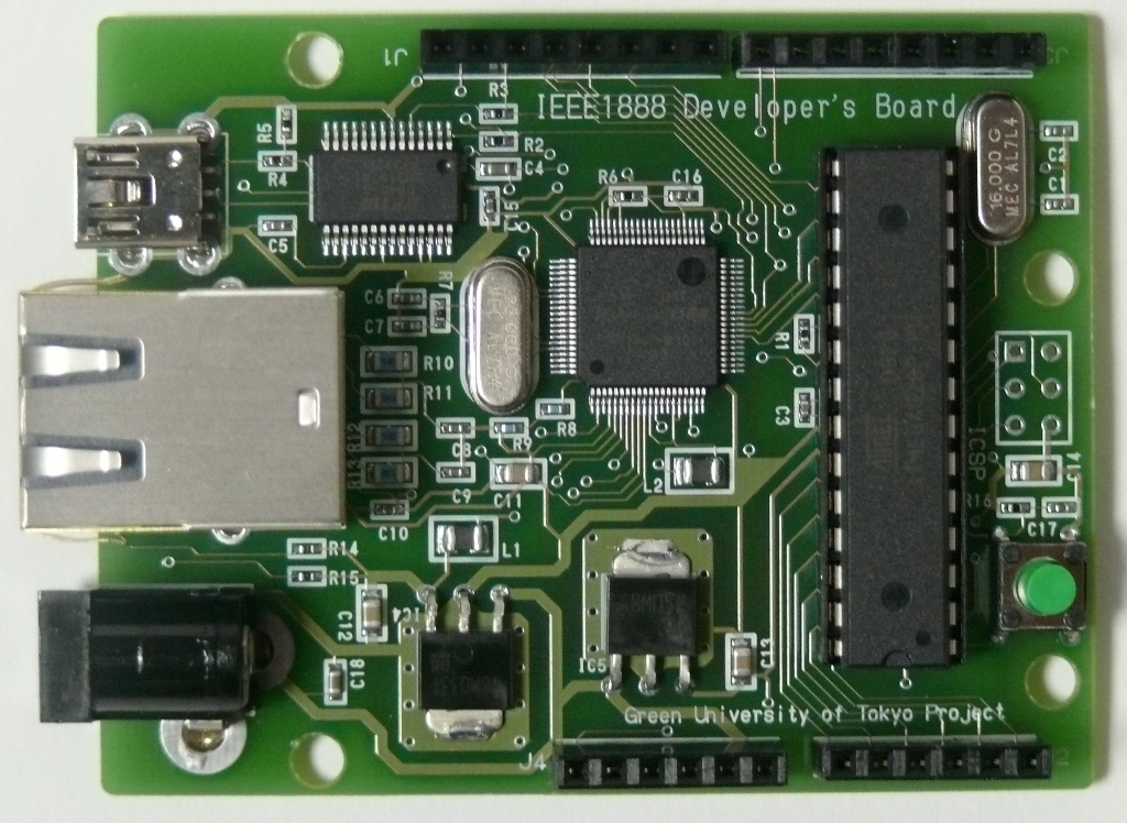 IEEE1888開発ボード (第一試作)